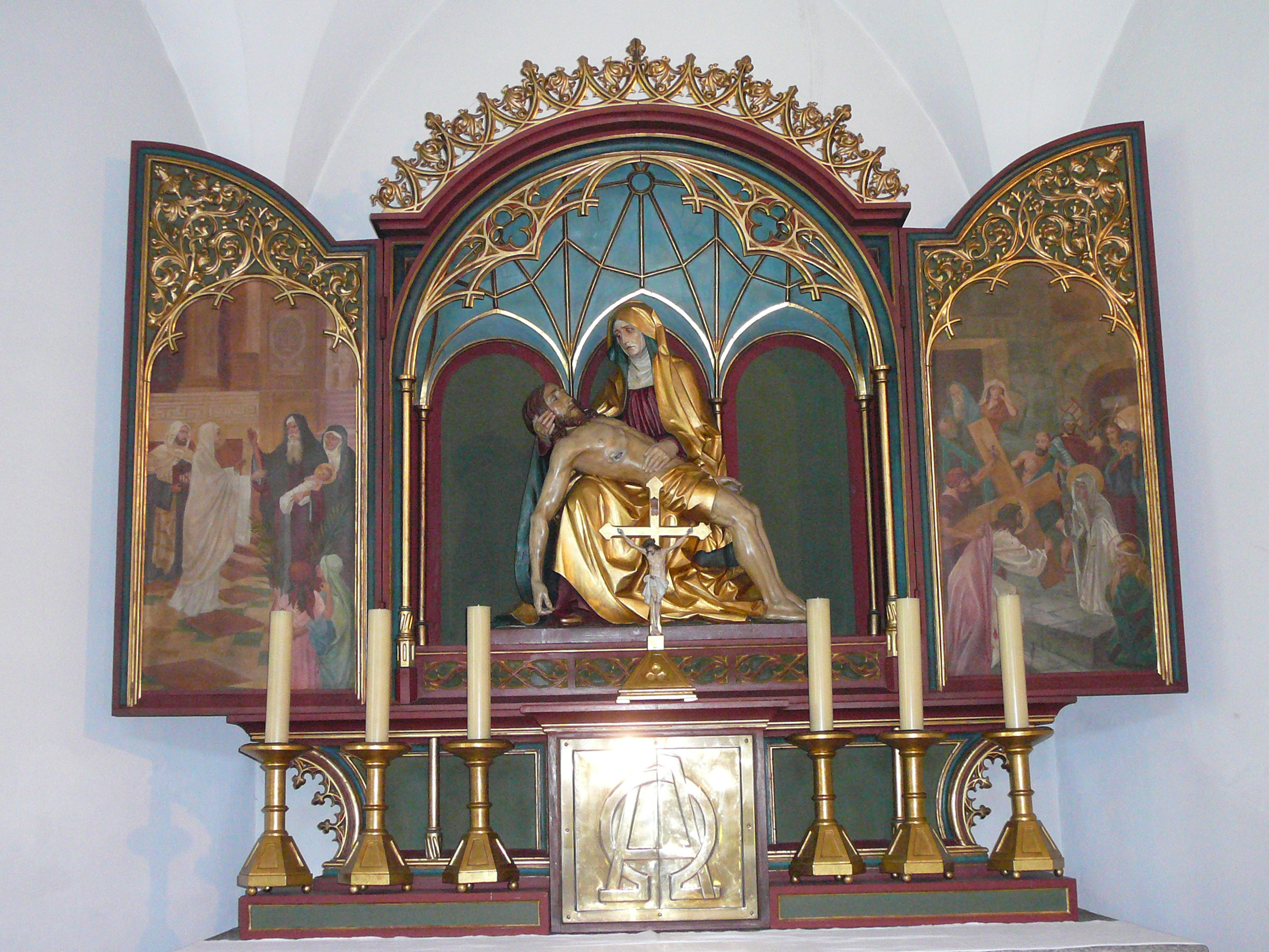 Römisch-katholische Kirche St. Christophorus, Niederhasli